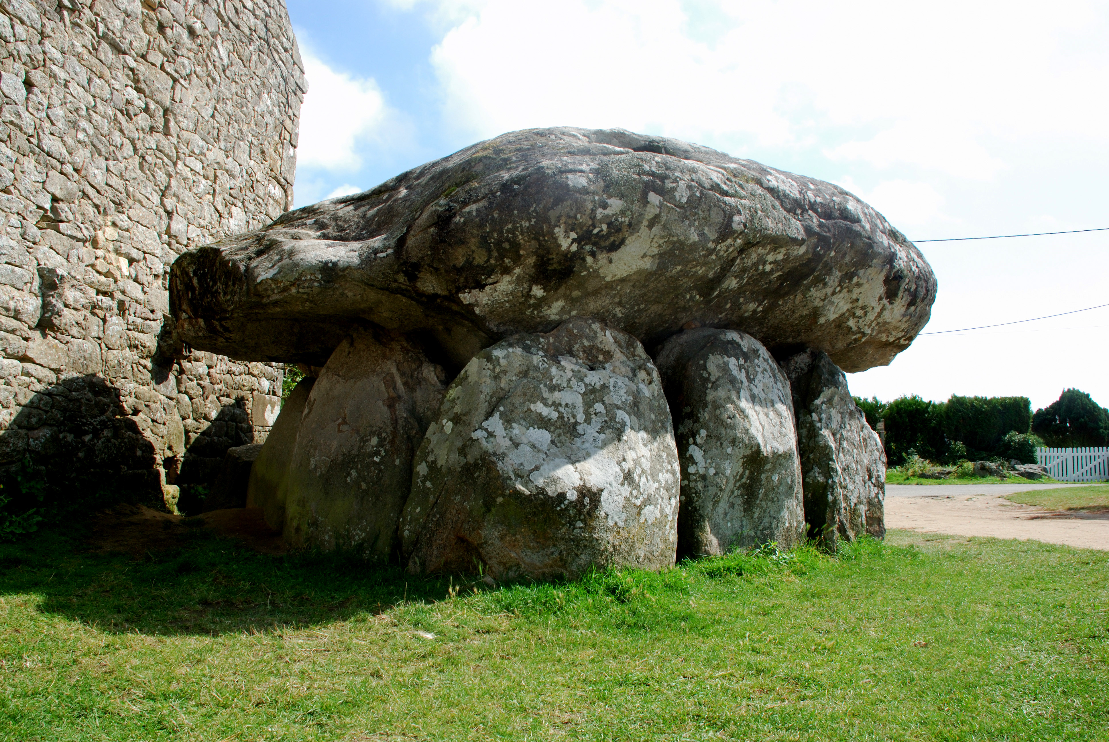 dolmen no lugarejo de Crucuno, França